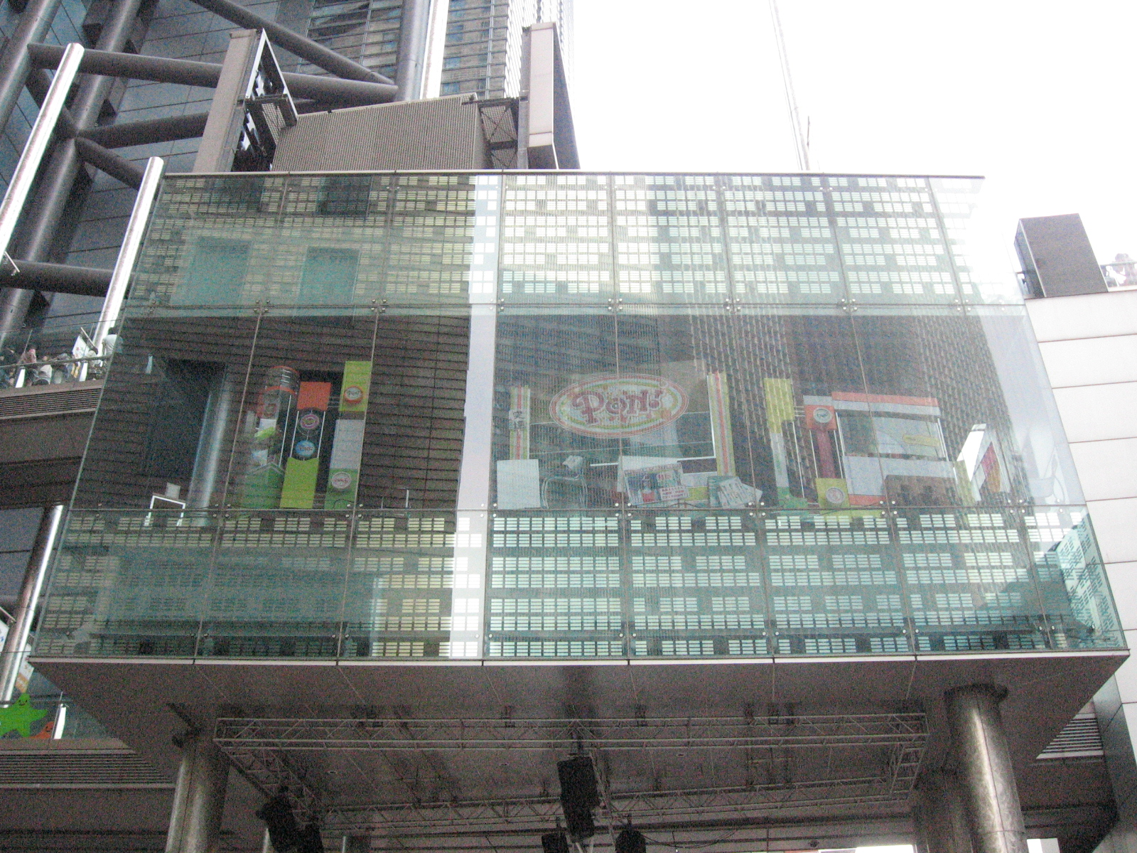 日本テレビ『ゼロスタジオ』。2011年現在、月～金曜午前に情報バラエティ番組『PON!』の生放送を行っている。 （日テレタワー・ゼロスタ広場から撮影）